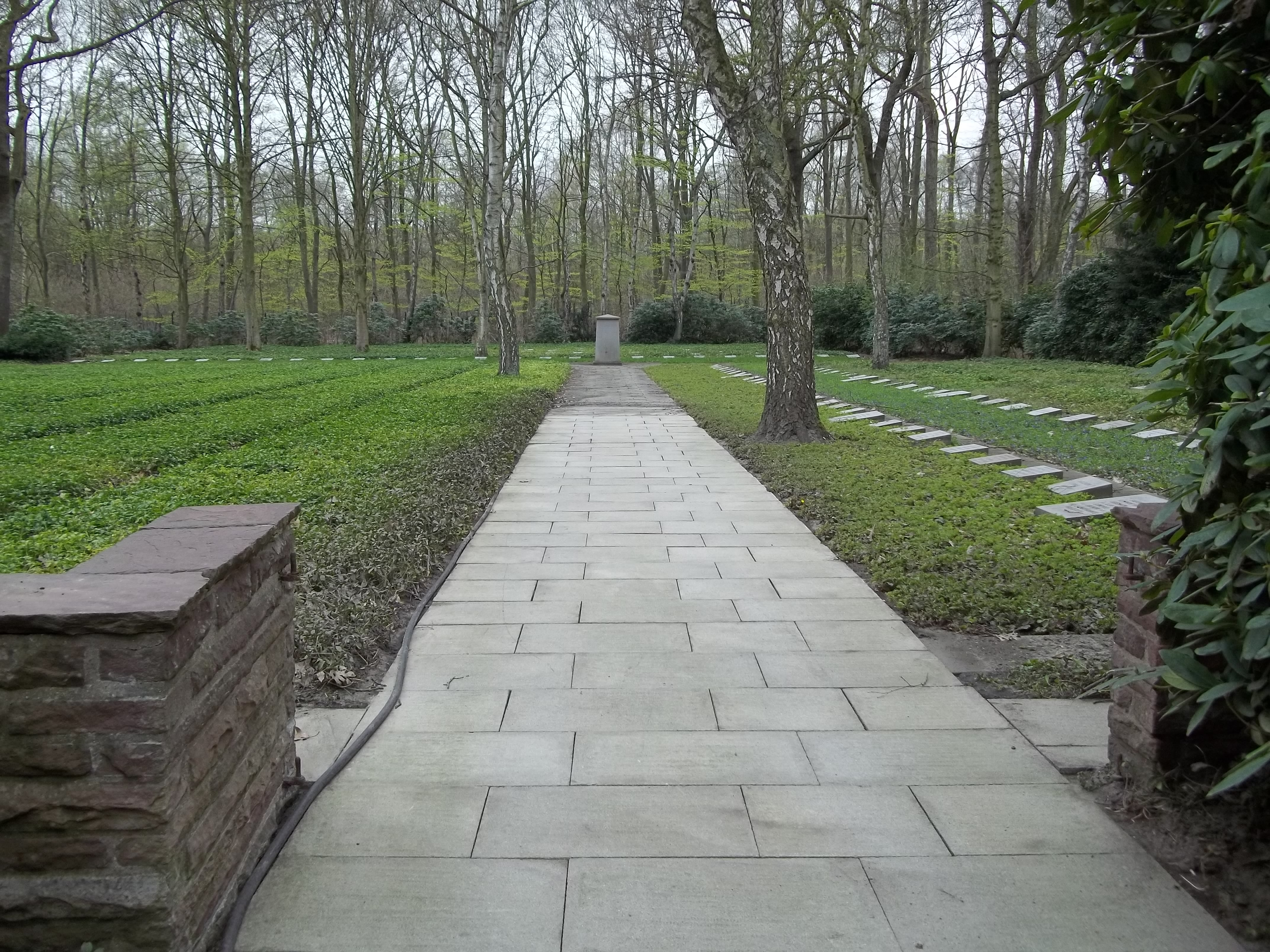 Waldfriedhof Herten